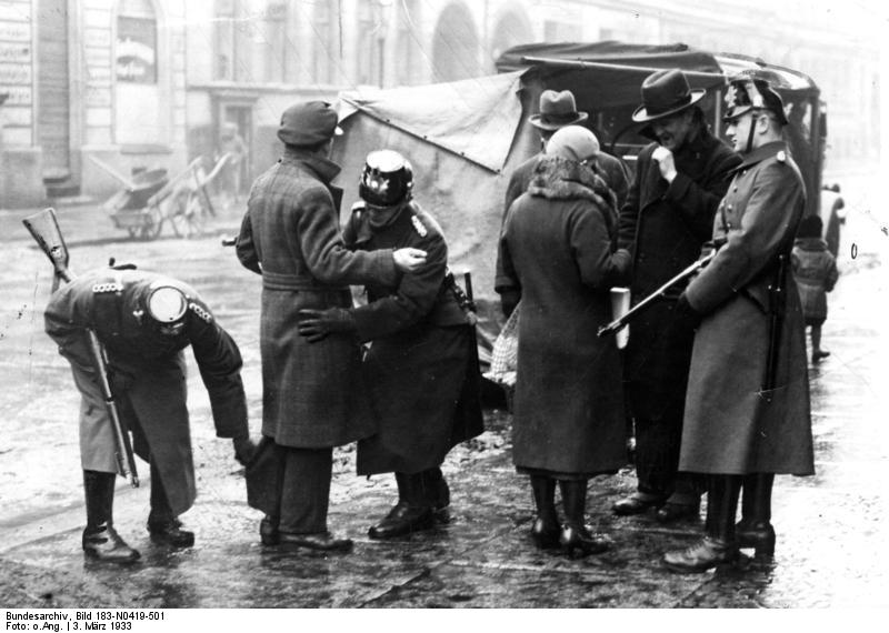 Berlin, Razzia in der Kösliner Straße, ADN-ZB-Archiv Deutschland 1933; Polizeirazzia am 3.3. 1933 in der Kösliner Strasse in Berlin, Passanten werden nach Waffen durchsucht. [Scherl Bilderdienst] [Berlin, Kösliner Straße.- Razzia, Polizisten bei Durchsuchung von Passanten]